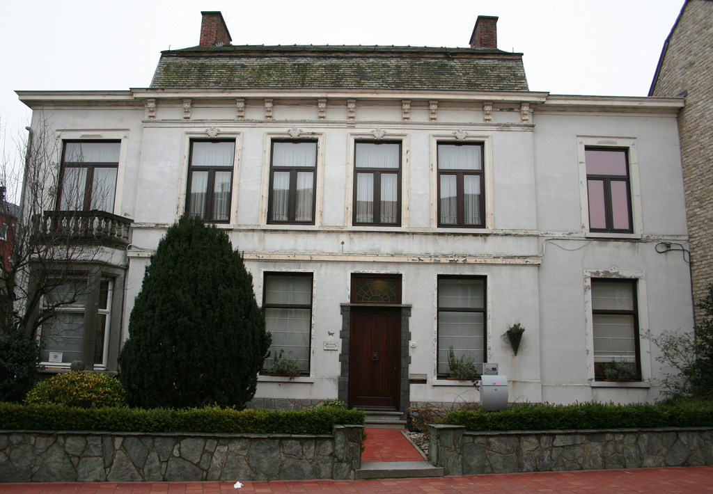 Brouwerij Labens 79″ N, 3° 08′ 07.66″ E